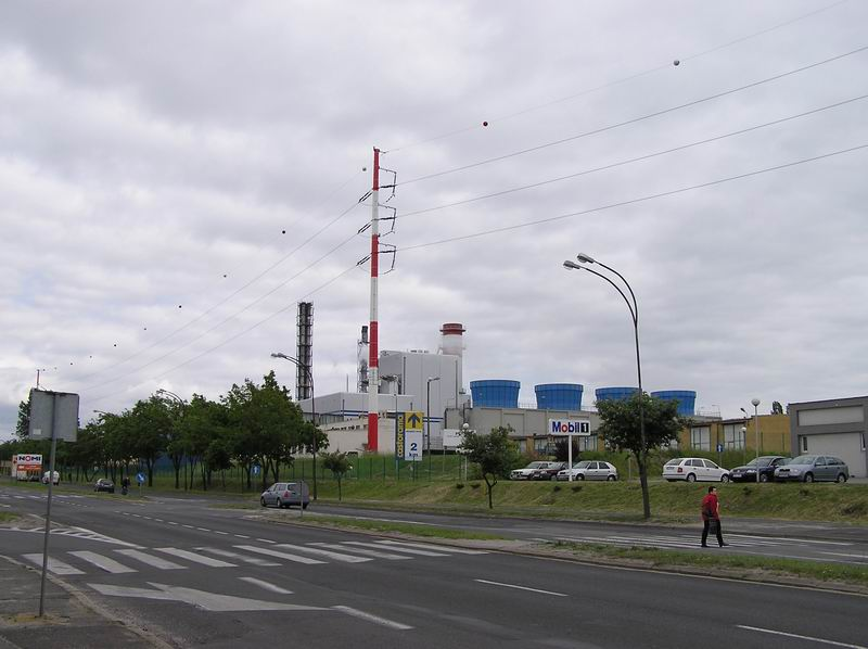 Zielona Góra Power Plant